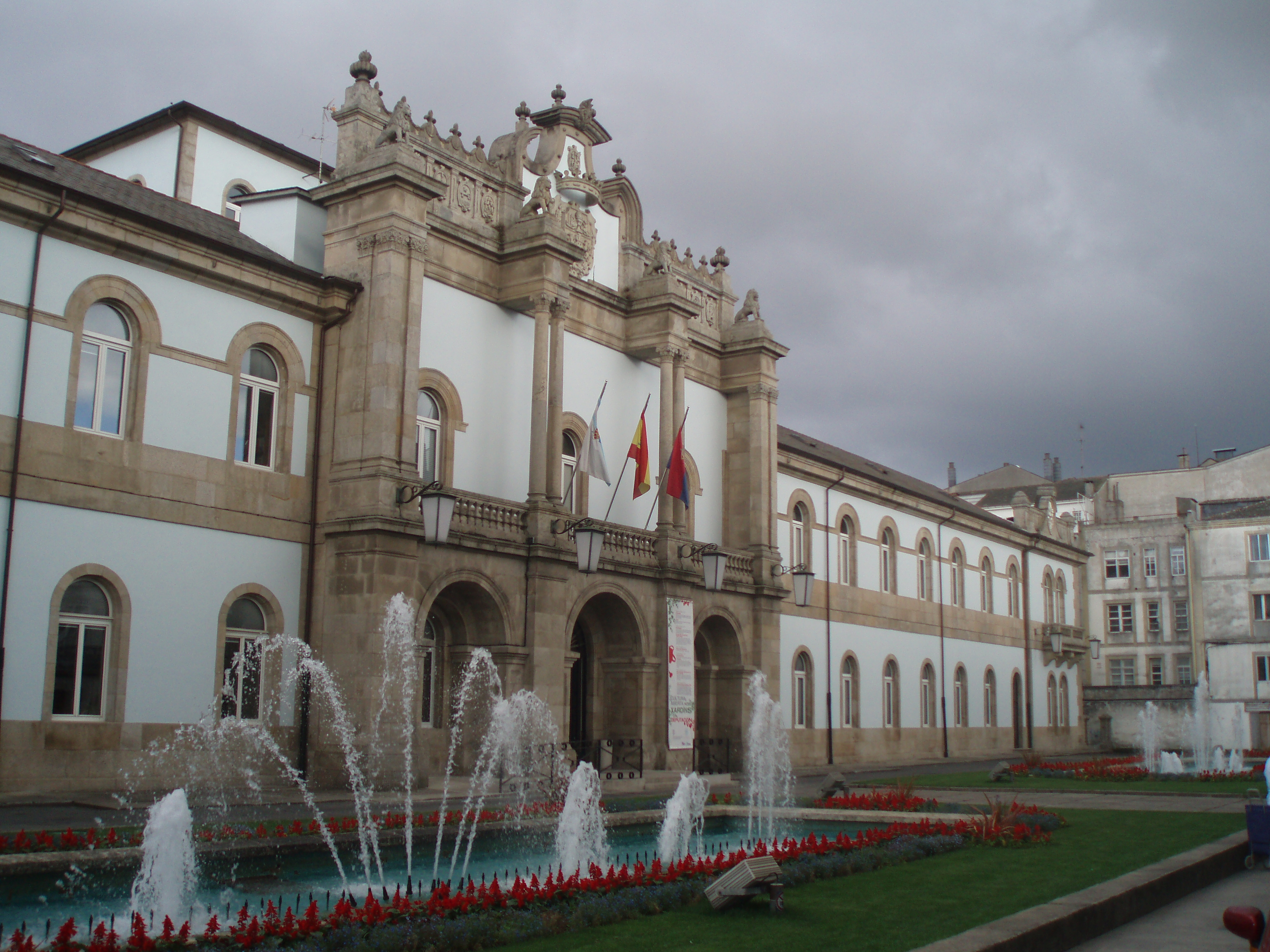 Diputación Provincial de Lugo, (España).